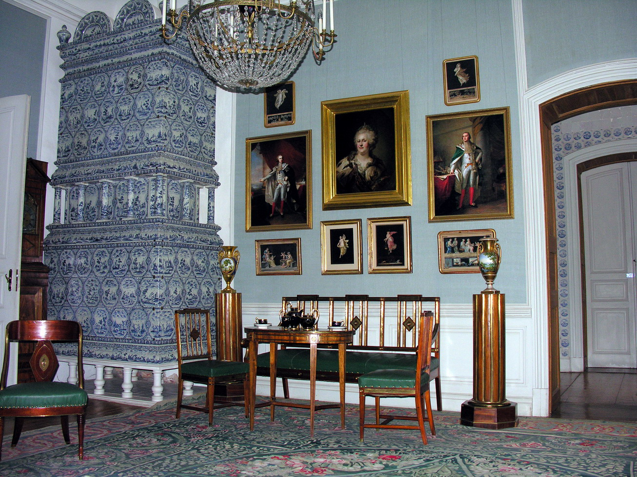 Žemaitėška: Rundalie (lt. Rundalė), 2008-10-01